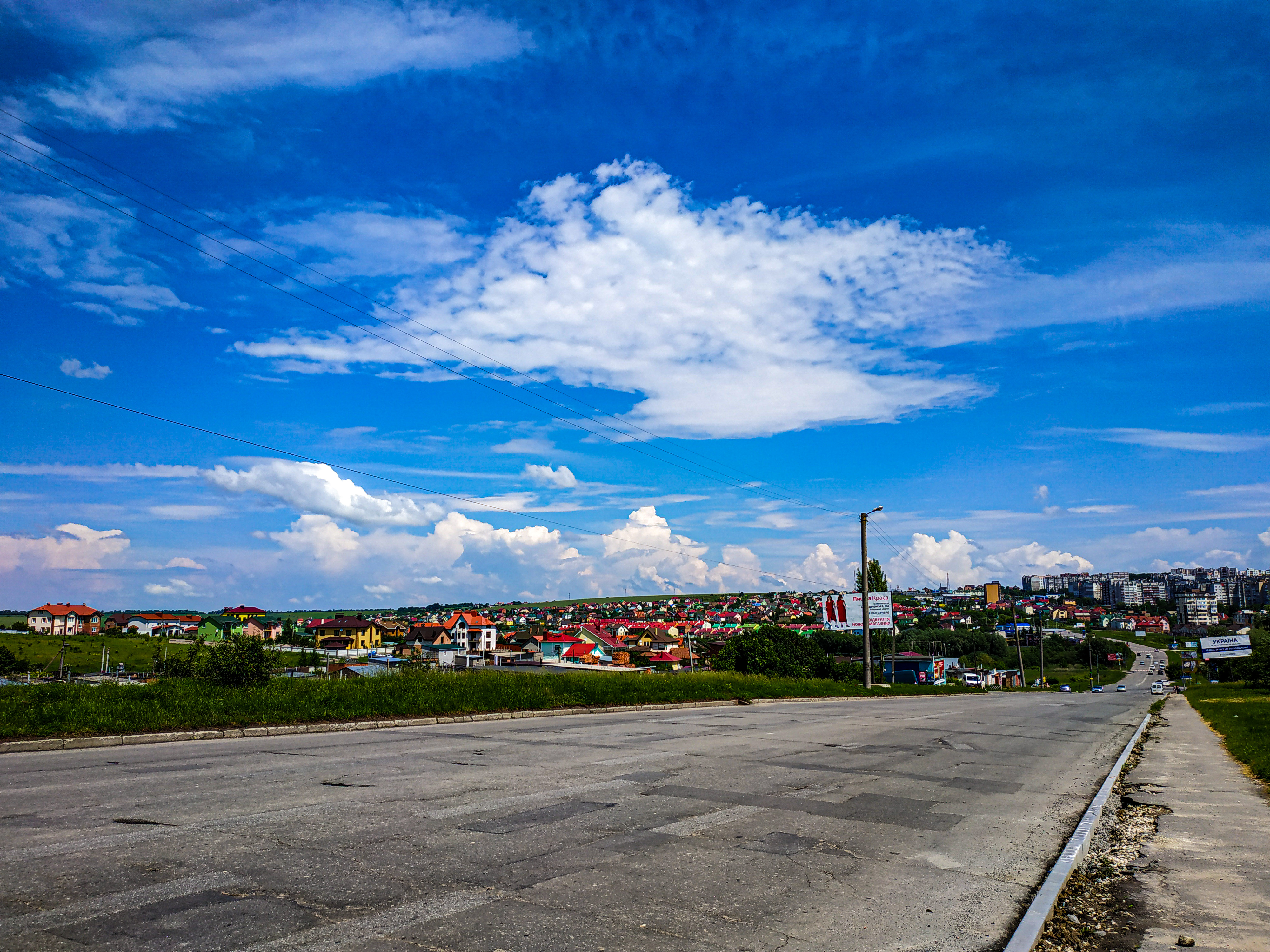 мікрорайони Озерна та Відрадне